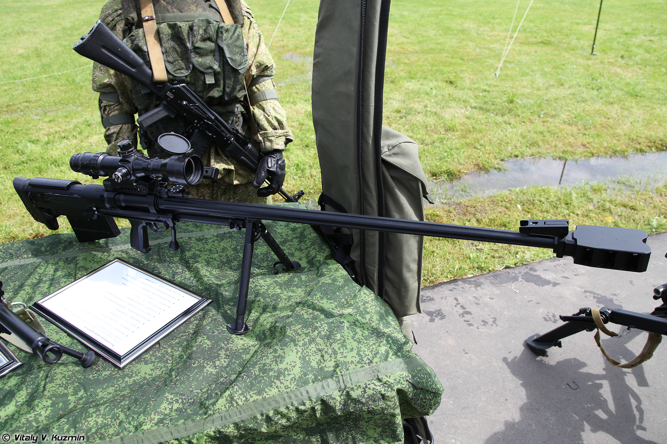 Модернизированная крупнокалиберная снайперская винтовка АСВК Корд-М 6В7М (12.7mm modernized sniper rifle ASVK Kord-M 6V7M)